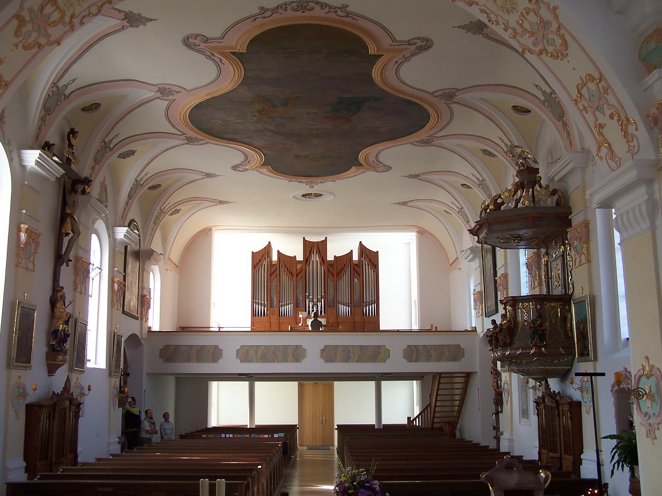 Langquaid Marktplatz 14. Katholische Pfarrkirche St. Jakob d. Ä. Saalkirche mit Steildach, eingezogenem Rechteckchor und Chorscheitelturm, Portalvorhalle nach Süden, Chor und Turm im Kern romanisch, 13. Jahrhundert, Langhaus spätgotisch, 15. Jahrhundert, Barockisierung der Anlage um 1740, Verlängerungen nach Westen, 1917 und 2004; mit Ausstattung. Langhaus mit Westempore und Jahn Orgel.